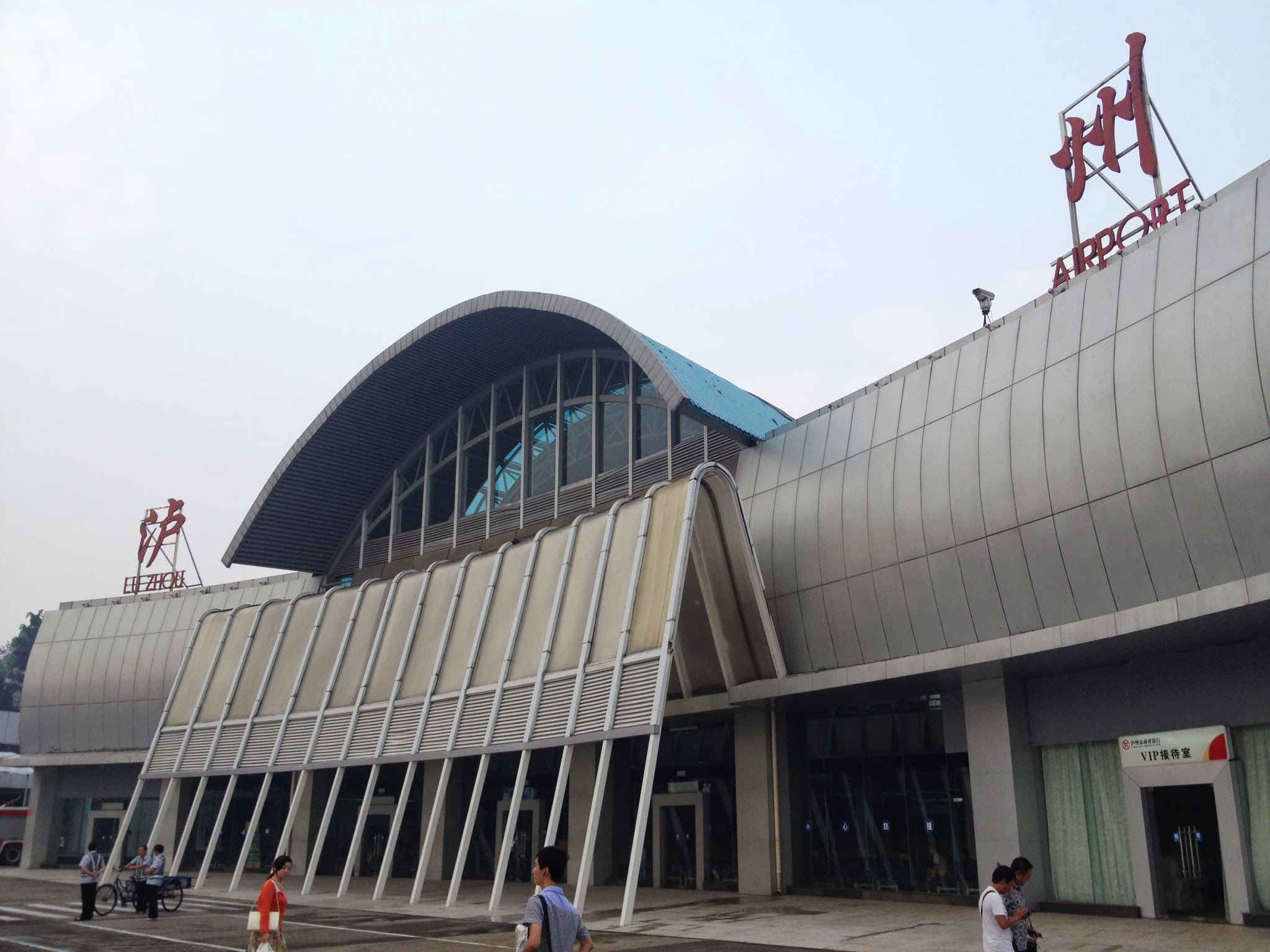 泸州蓝田机场航站楼（内场角度）